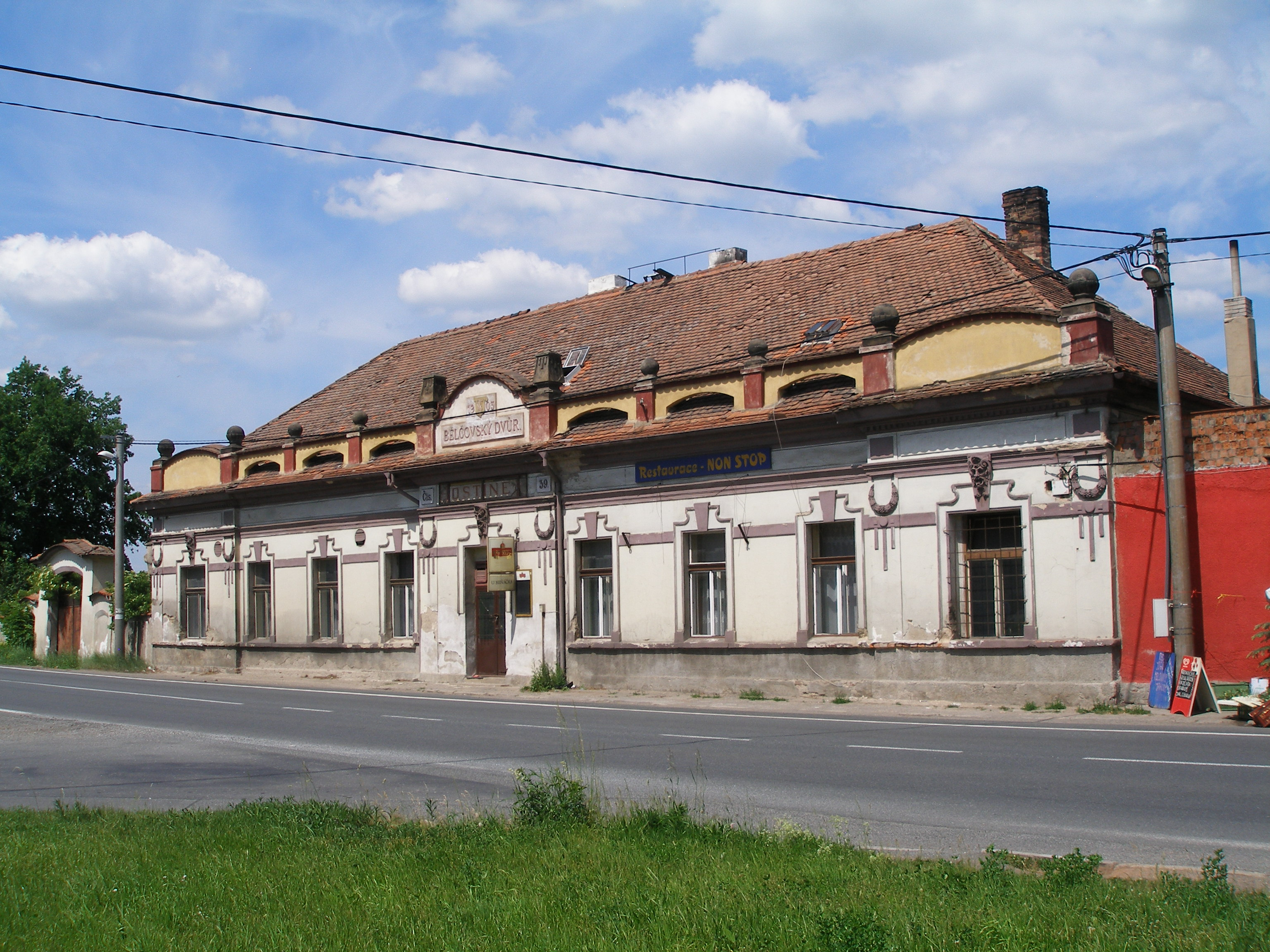 Hostinec Belčovský dvůr v Ješíně.